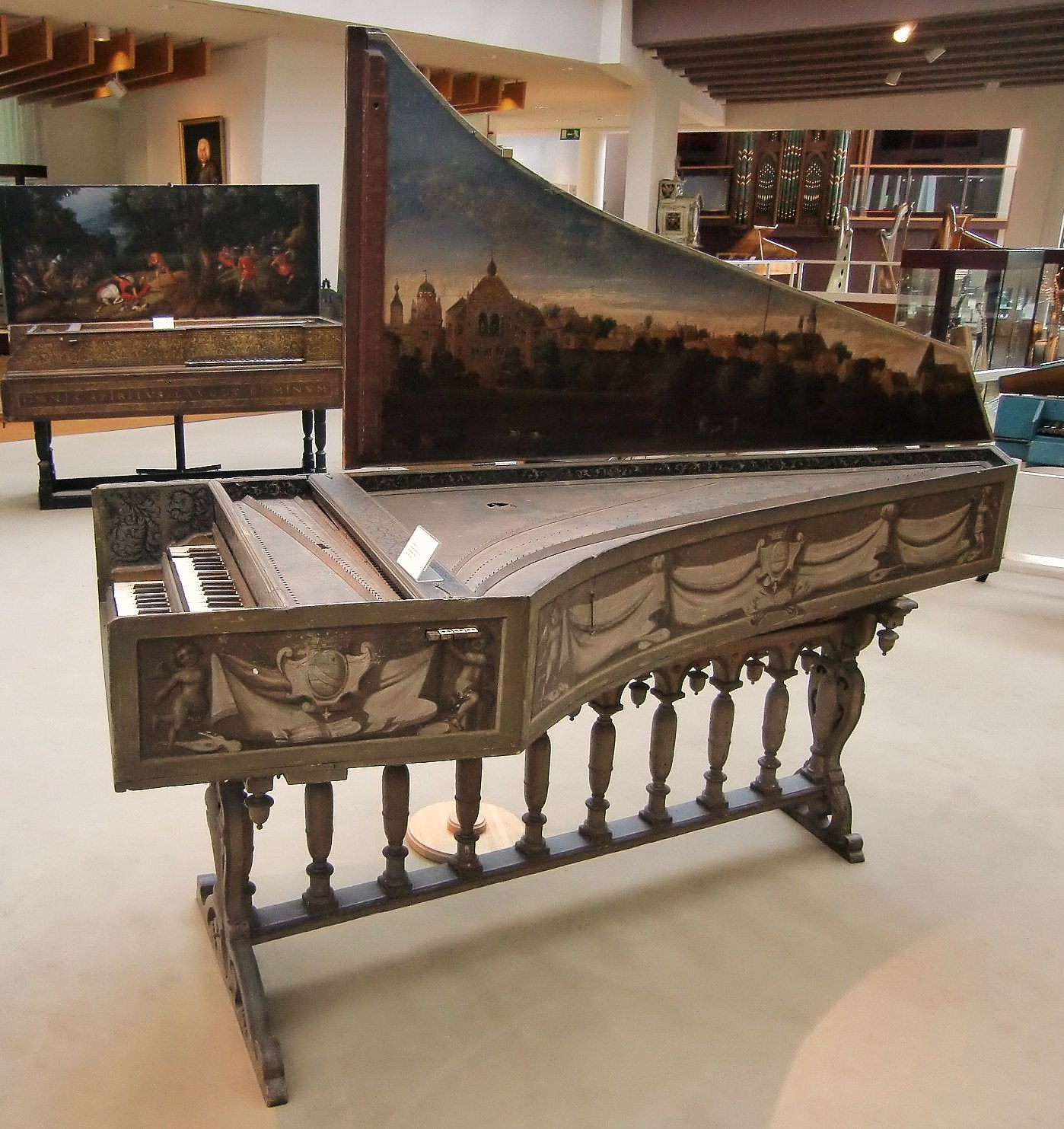 Clavecin d'Andreas Ruckers père (Anvers 1620) - Berlin, Musikinstrumentenmuseum